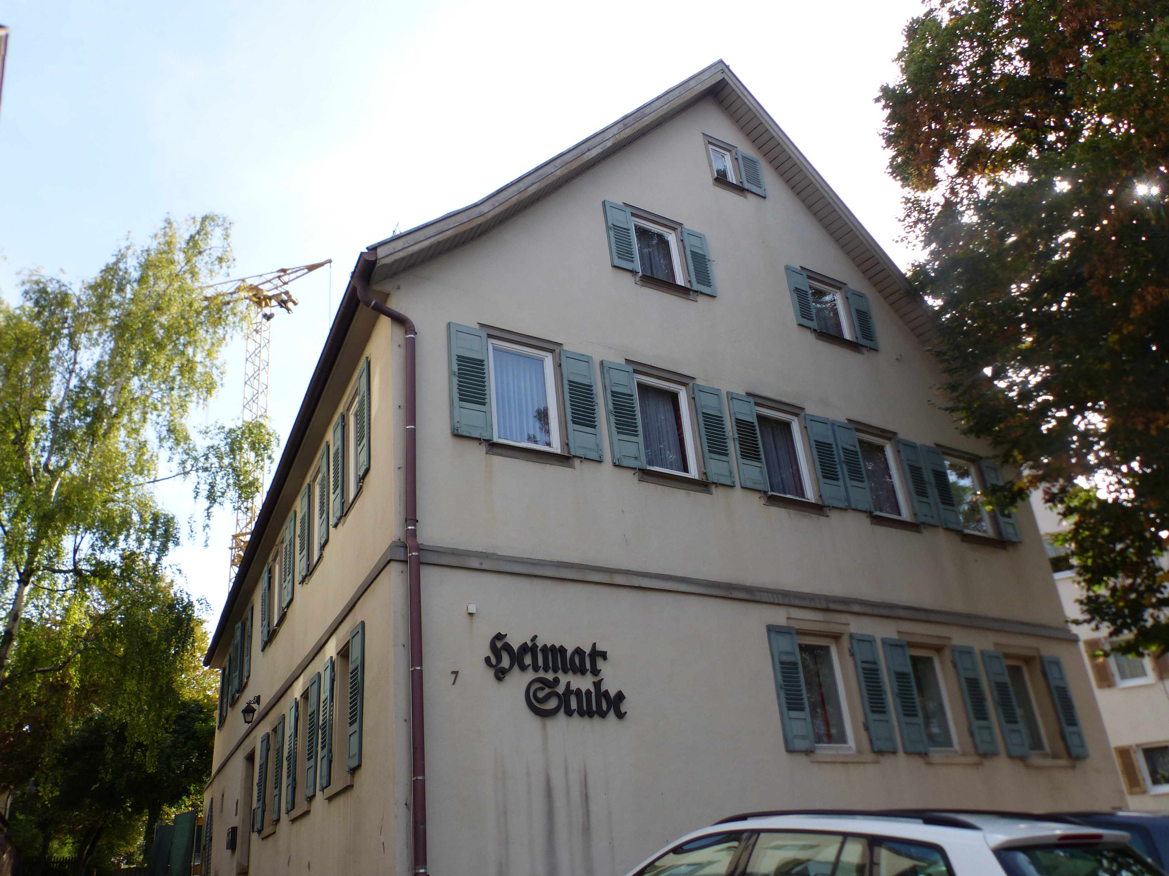 Stuttgart, Ditzinger Straße 7, Ehemaliges Evangelisches Pfarrhaus